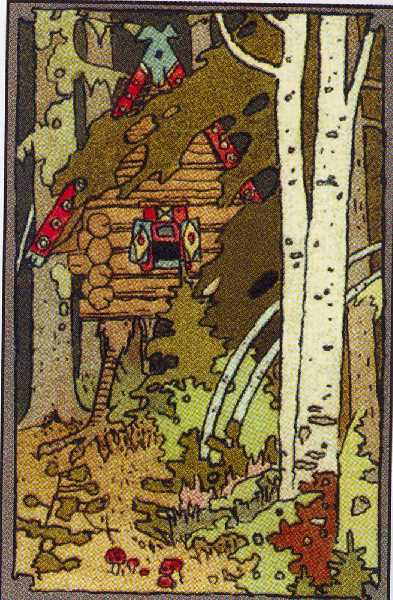 И. Я. Билибин Рис. для первой страницы обложки книг серии "Сказки", 1899 г.